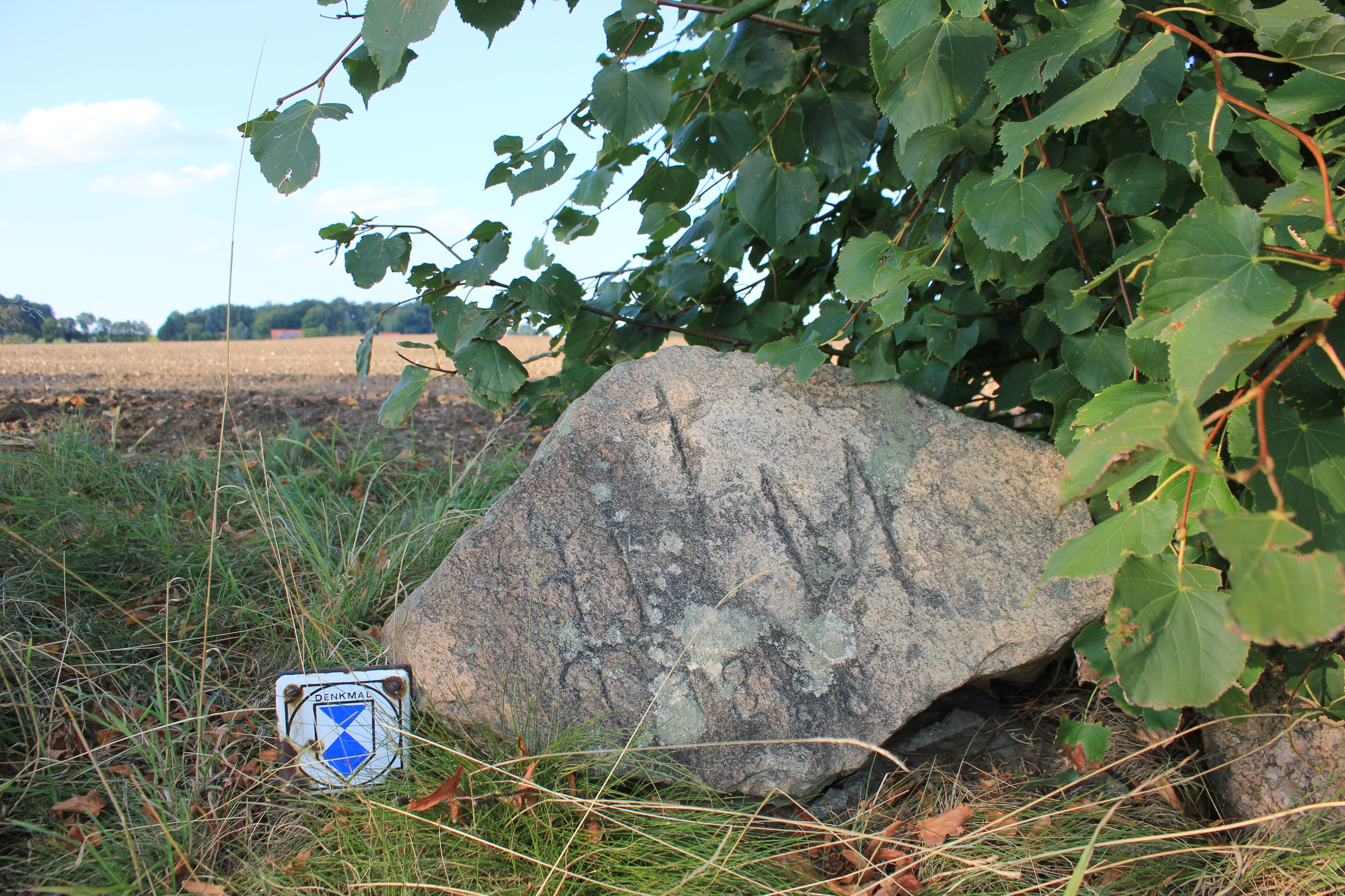 Hornjoserbsce: Wopomnjenski kamjeń za Pětra Młónka mjez Praskowom a Małej Boršću